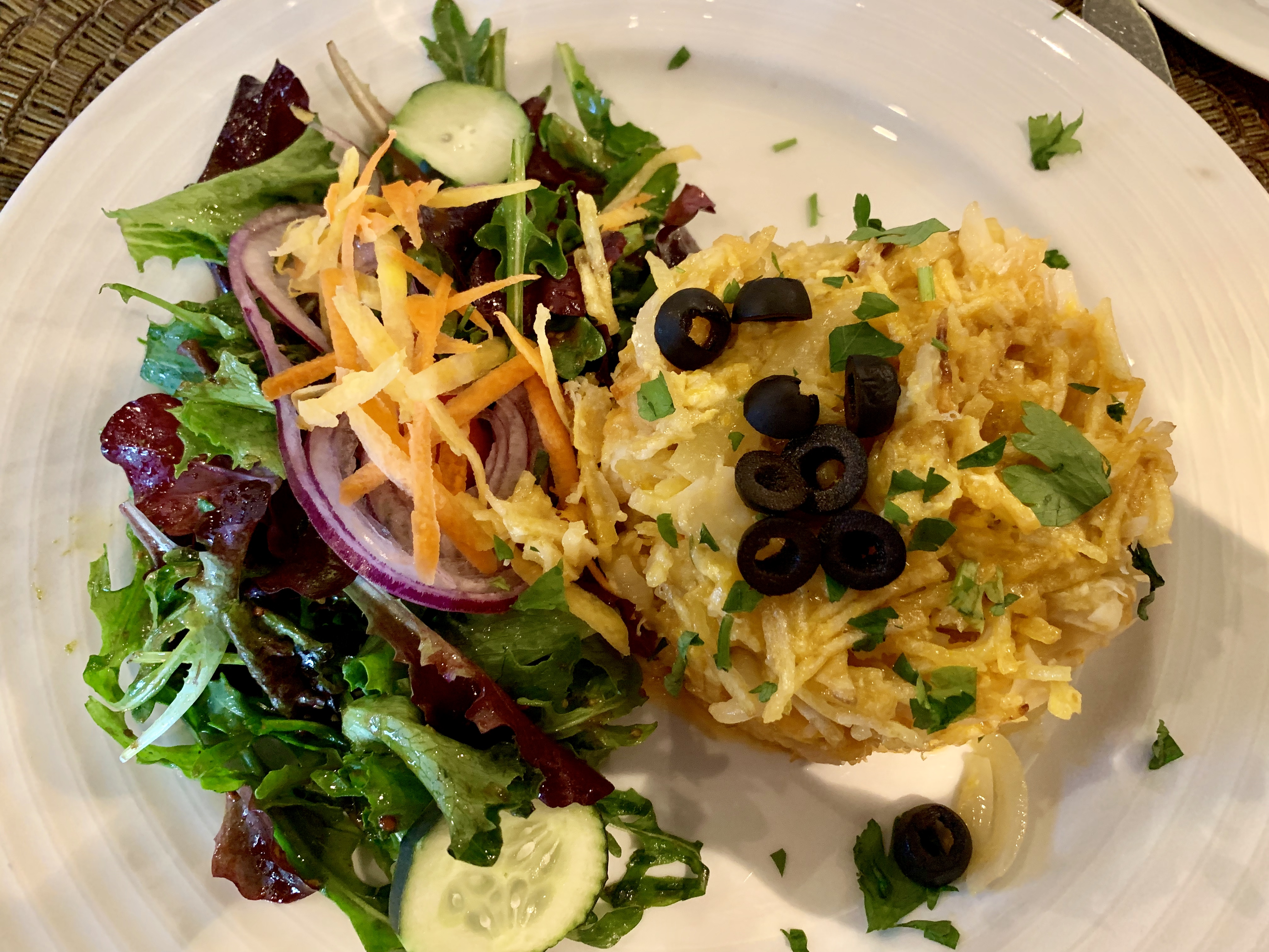 Bacalhau à Brás at Restaurante Figus, Lisbon